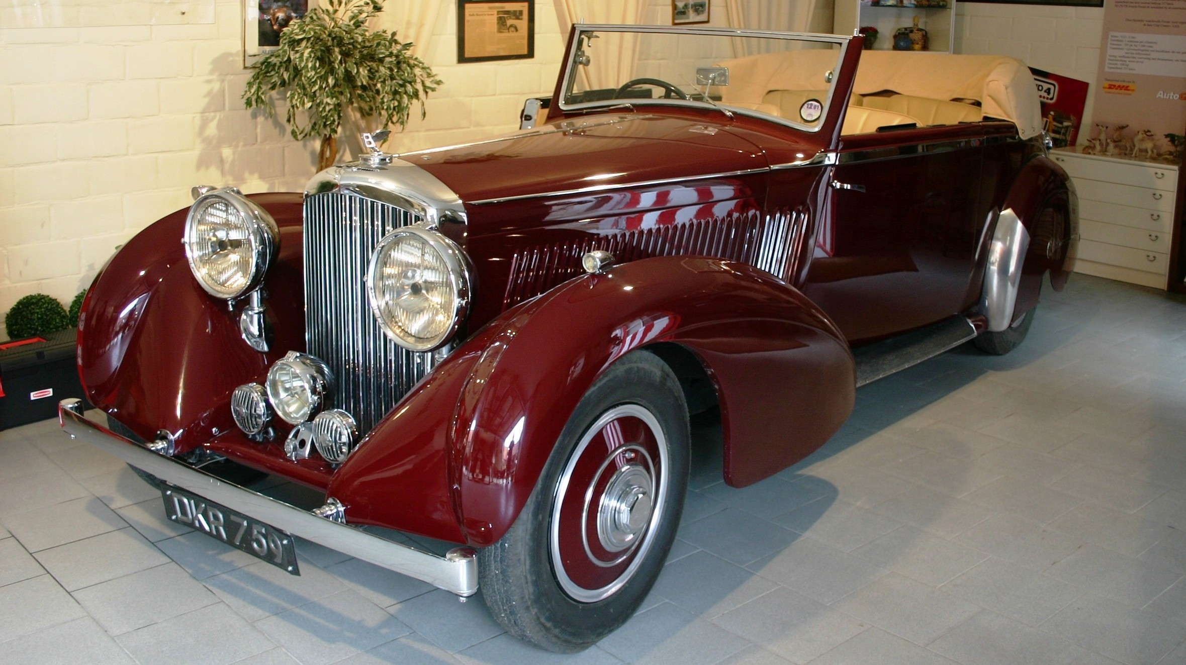 Collection de Schaetzer. 1937 4.25-litre Bentley drophead coupe by James Young (DVLA) first registered 4 May 1937, 4250 cc